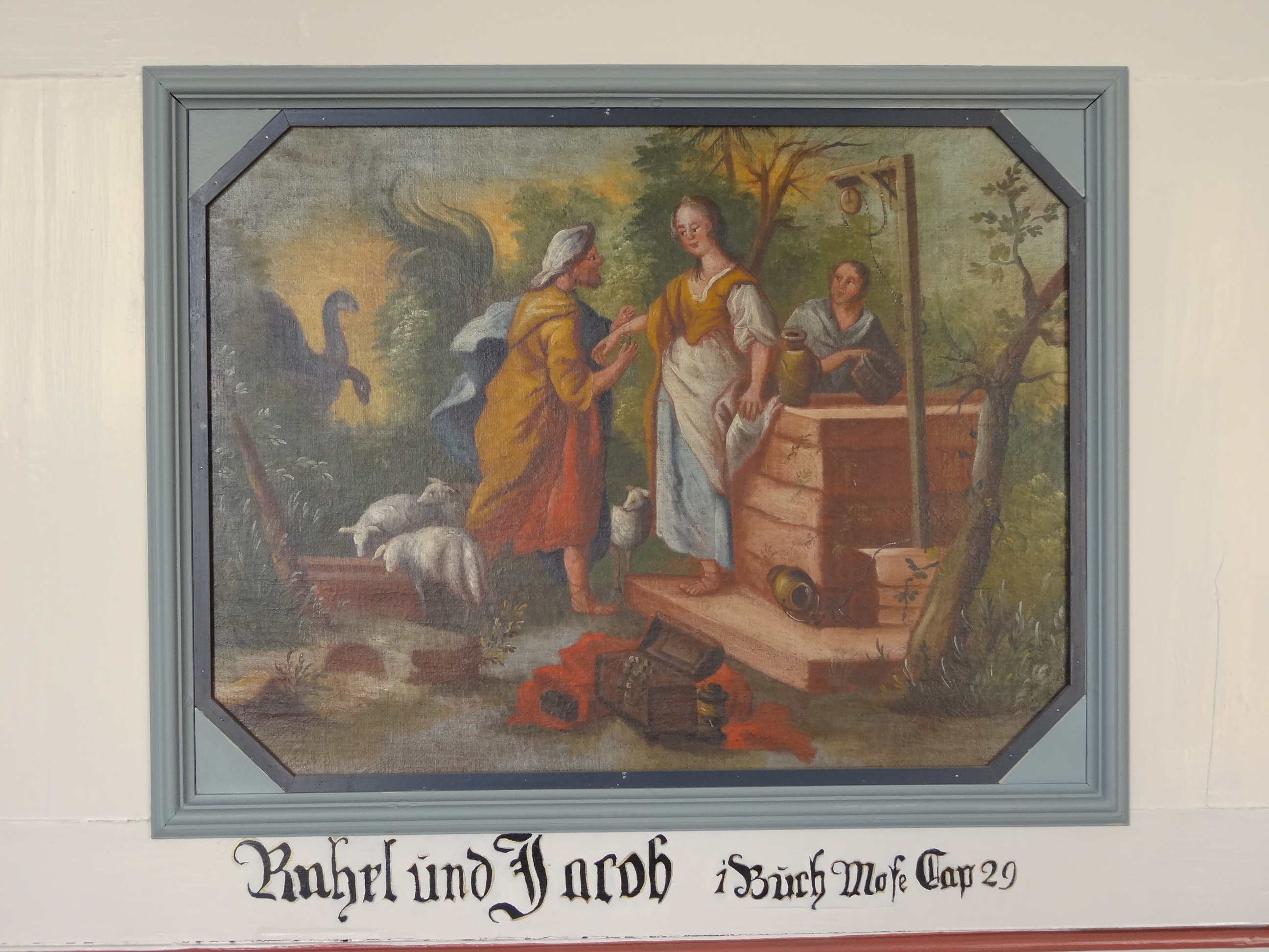 Daniel Hisgen (1733–1812) Alternative namesMeister von LichDescription German painter Date of birth/death10 April 173319 February 1812Location of birth/deathNieder-WeiselLichWork periodKirchenmaler des RokokoWork locationOberhessenAuthority control : Q17538918